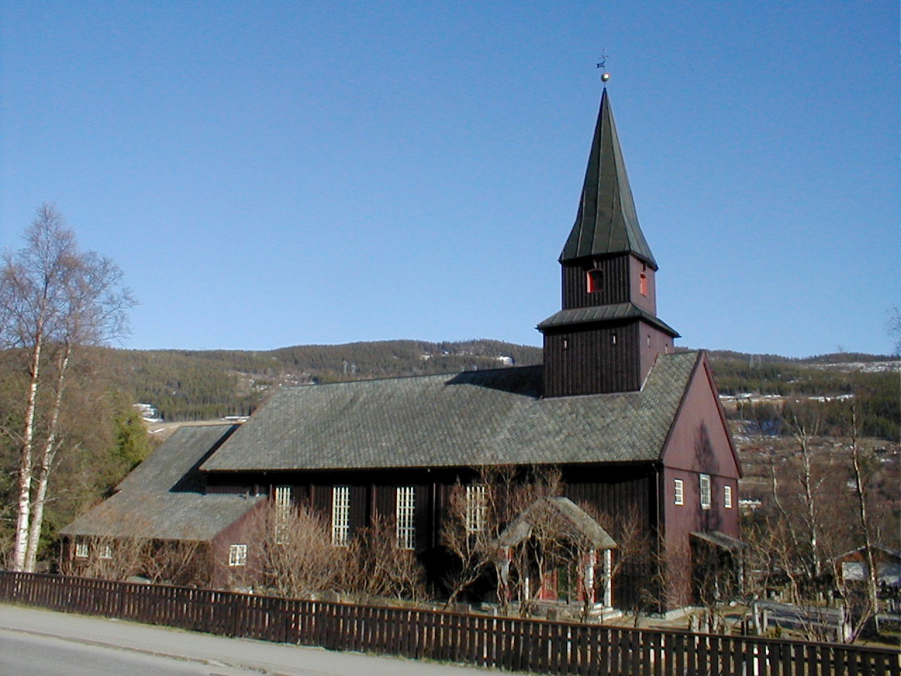 Ål kyrkje / Ål kirke i Ål kommune, Buskerud fylke, Norge.